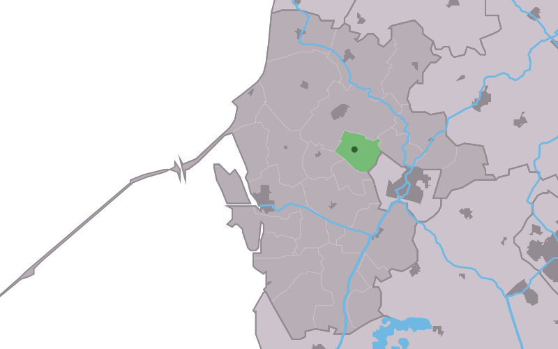 Kaartsje fan himrik fan Skettens